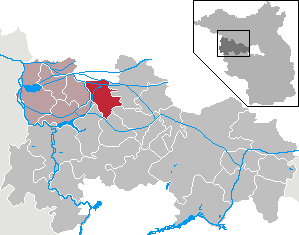 Kleßen-Görne in Brandenburg (Country) - District Havelland